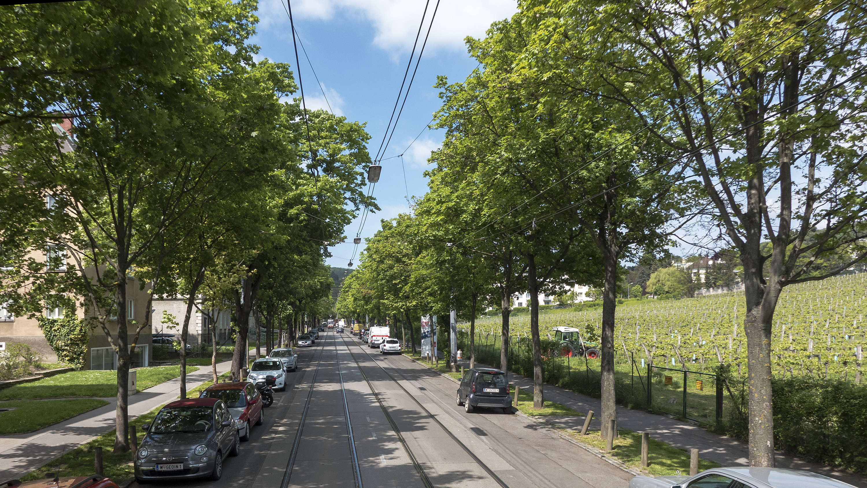 Alszeile in Wien 17 bei Nr. 97 Richtung Westen